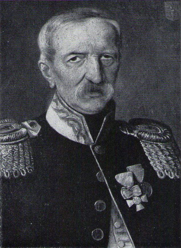 Clemens August Maria Caspar Maximilian Graf von Korff-Schmising (1804-1882), Landrat